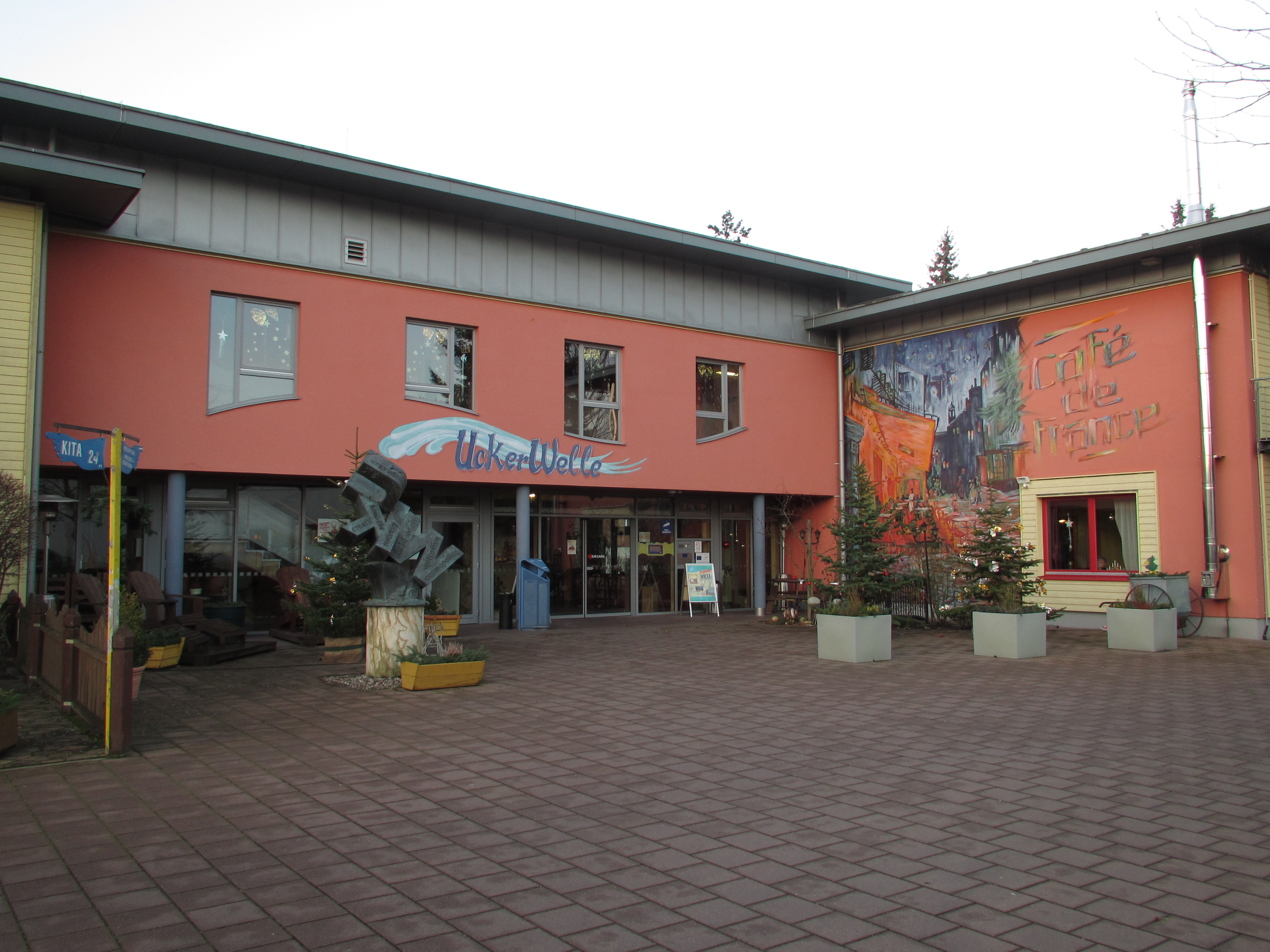 Internationales Jugendgästehaus, EUROBEST "UckerWelle" in Prenzlau, DJH Jugendherberge Prenzlau-Europäische Begegnungsstätte UcKerWelle (UKW)